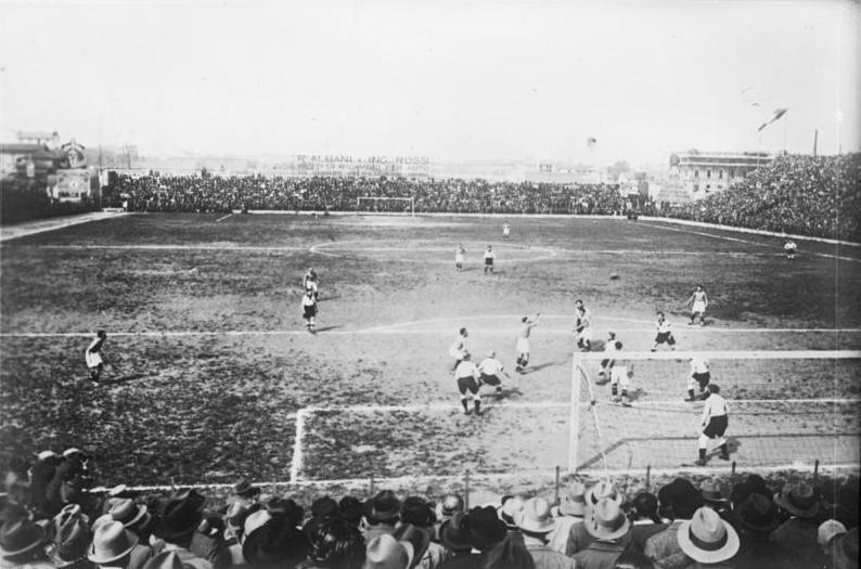 Der deutsche Fussballsieg in Mailand! Blick in das überfüllte Stadion in Mailand während des Fussballspiels Deutschland/Italien. Kritische Szene vor dem deutschen Tor. Information added by Wikimedia users.Partita Italia-Germania a Milano nel maggio 1929. Anmerkung: Es gab 1929 kein Länderspiel DE-IT in Mailand; sondern in Turin. In Mailand spielte der DFB vor 1945 lediglich 1923 und 1940; jeweils im Winter.